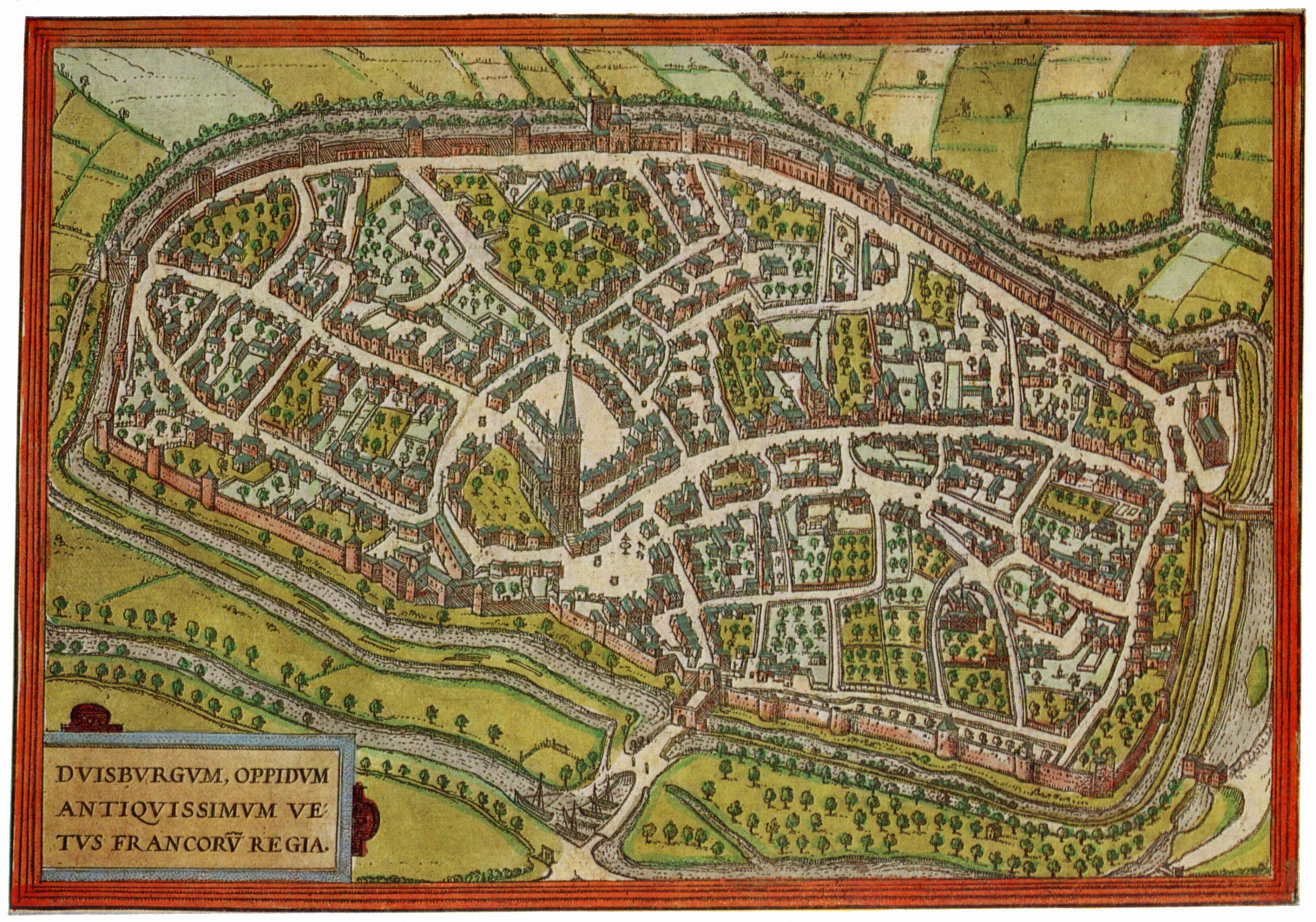 Historische Postkarte von Duisburg Kupferstich, koloriert, vom Künstler Franz Hogenberg, Aus: Georg Braun und Franz Hogenberg, »Civitates orbis terrarum«, Band 2, Köln 1575